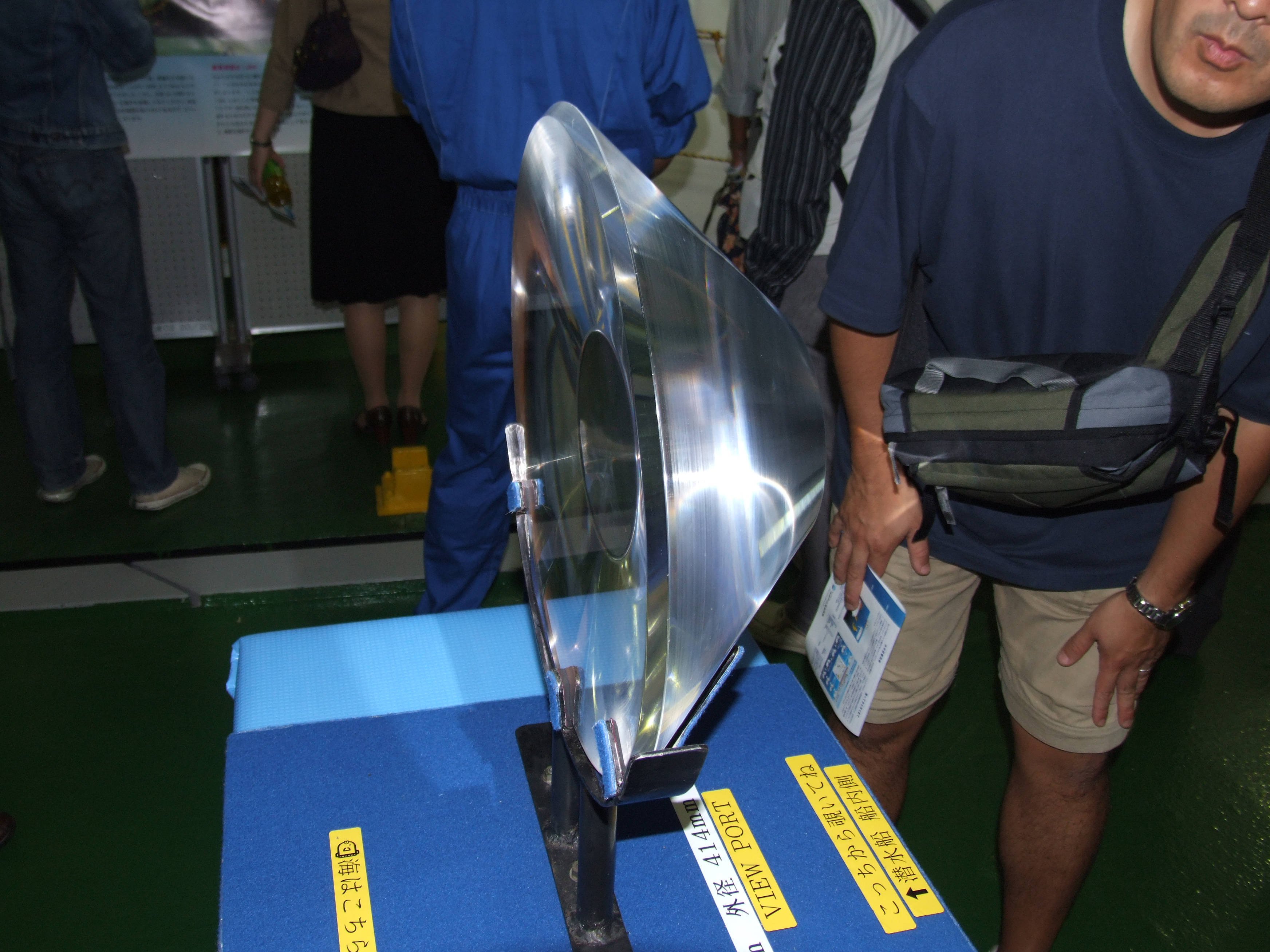 しんかい6500の窓ガラス（横浜港開港150年での母船よこすかの船内開放での撮影）